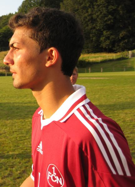 Güngör Kaya